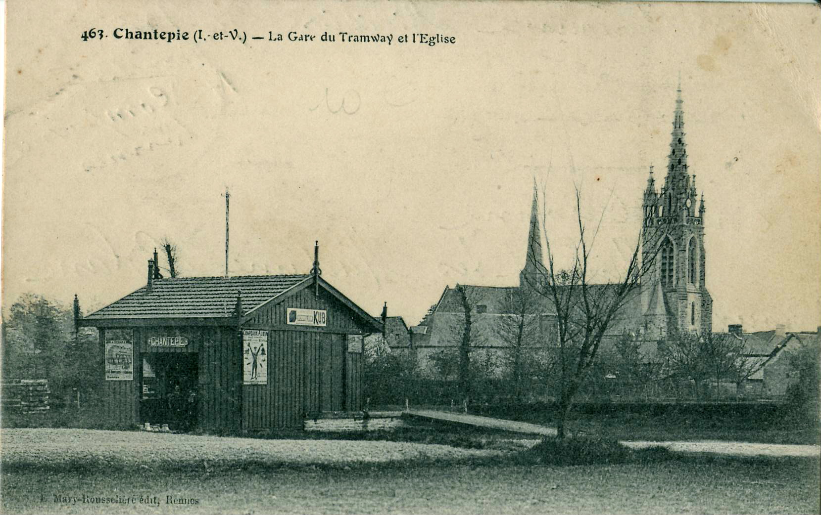 Carte postale ancienne éditée par E. Mary-Rousselière, n°463 : CHANTEPIE - La Gare du Tramway et l'Église